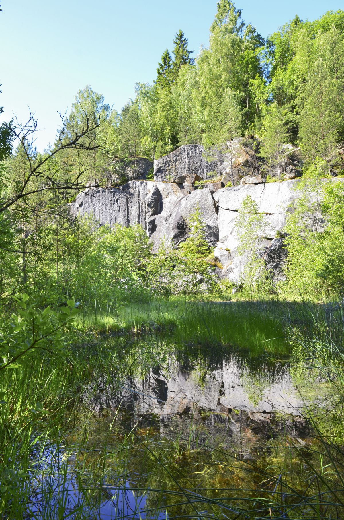 Dammen er et av få amfibiereservater i Vestfold.